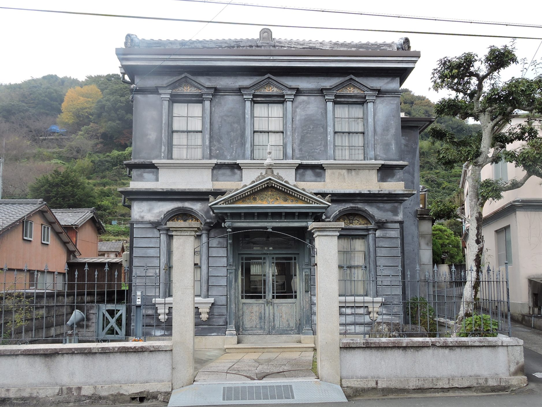 紡績業などで財を成した「白石和太郎」が作らせたと言われ、昭和２５年～平成元年まで川之石ドレスメーカー専門学校として使用され、地元ではドレメと呼ばれている